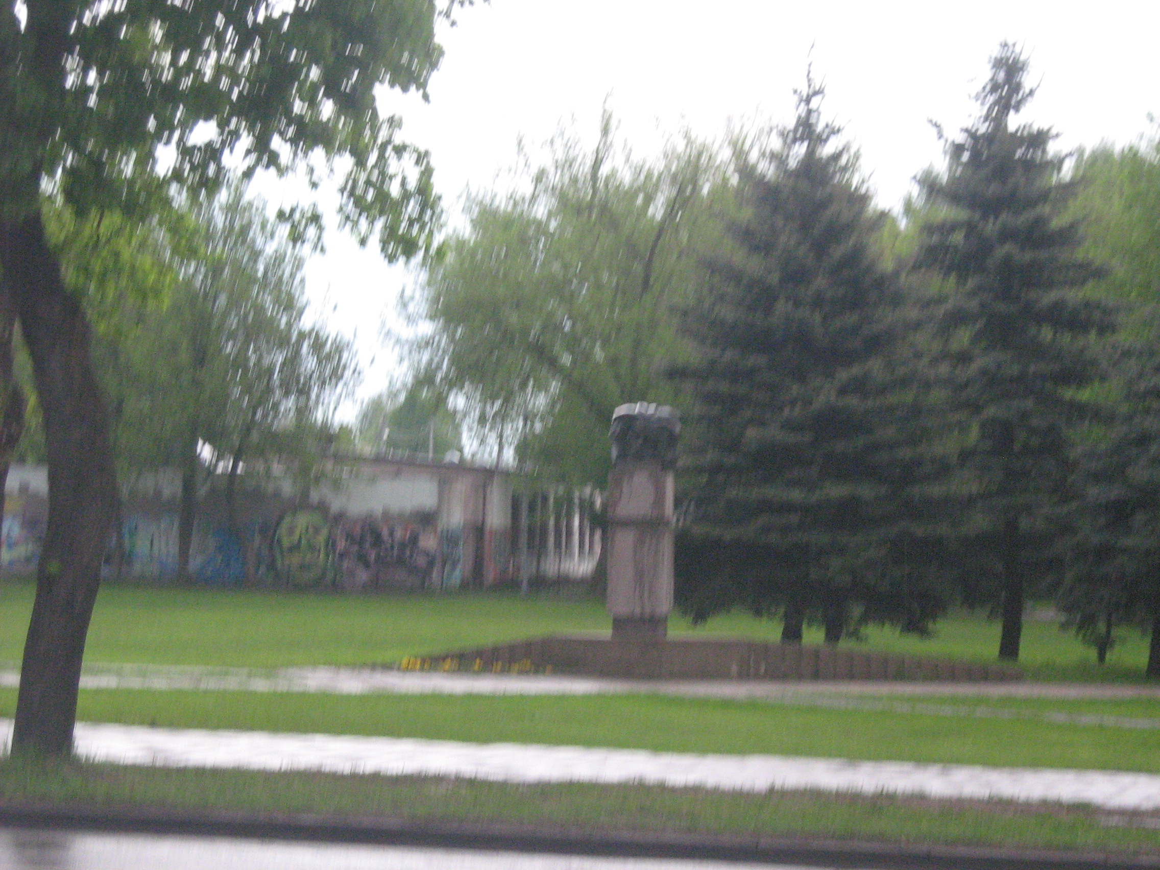 Petro Vaičiūno paminklas ramybės skvere Jonavoje